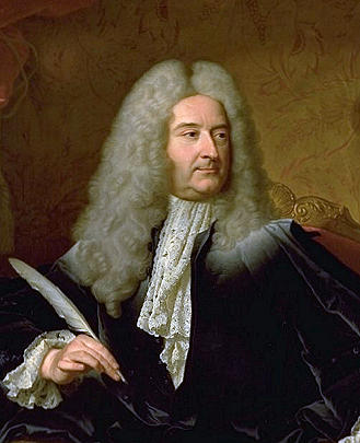 Porträt des Franz von Pidoll